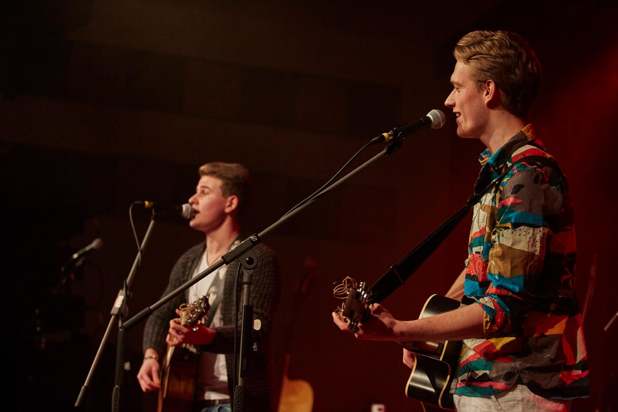 Gerner&Tschann 2016, Hallwang